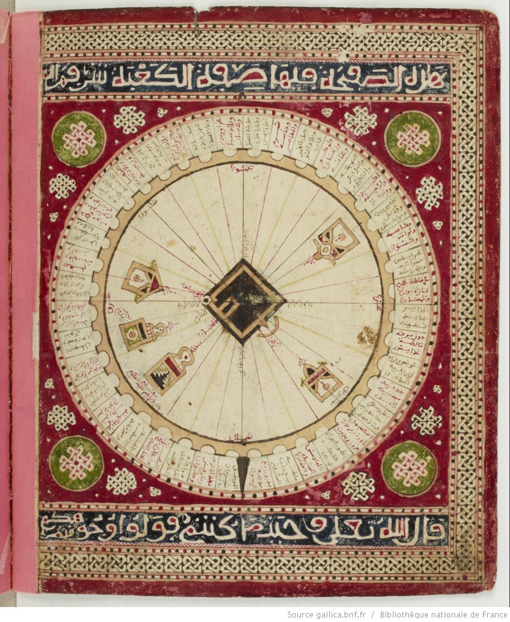 صفة الكعبة المشرفة من كتاب على بن احمد الشفاقسي و اتجاهات البلدان بالنسبة لكل ركن من اركانها و جدار من جدرانها